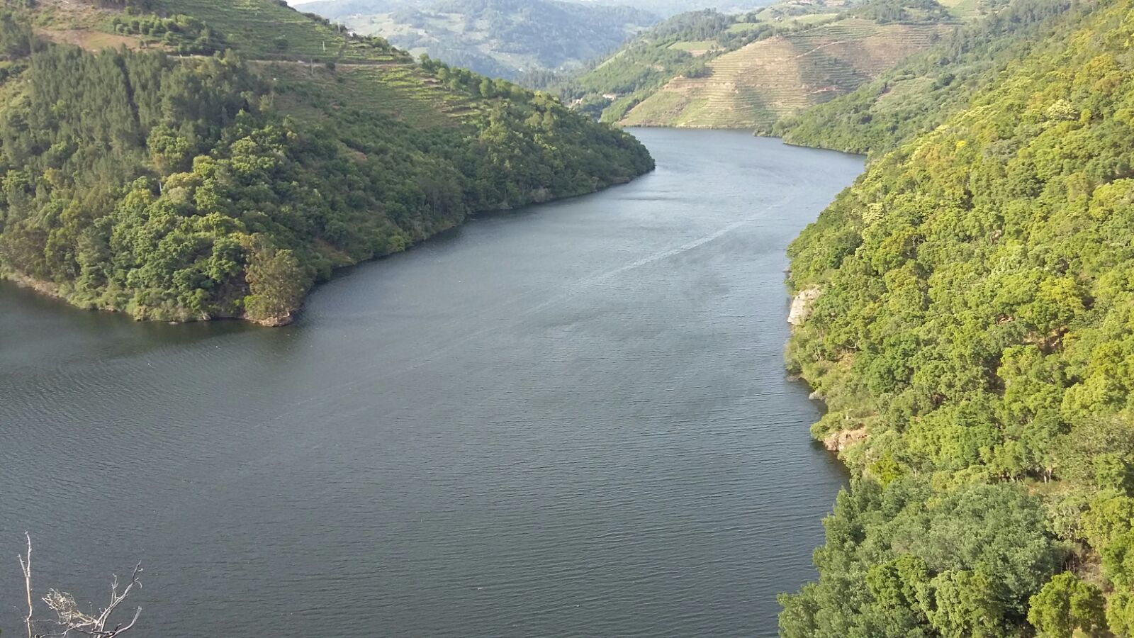 Vistas do Río Miño dende o Castro de Marce